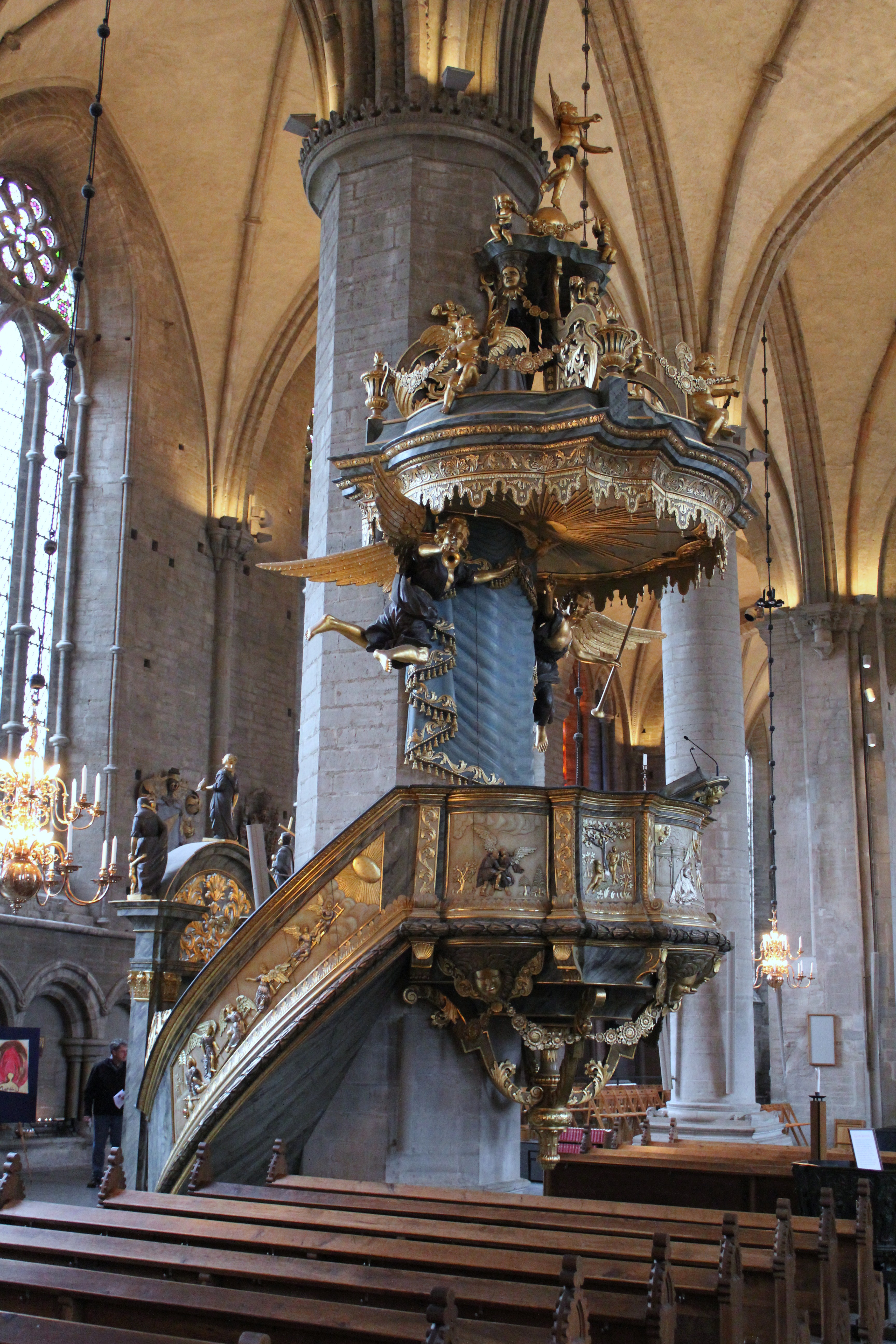 Linköpings domkyrka. Predikstol.